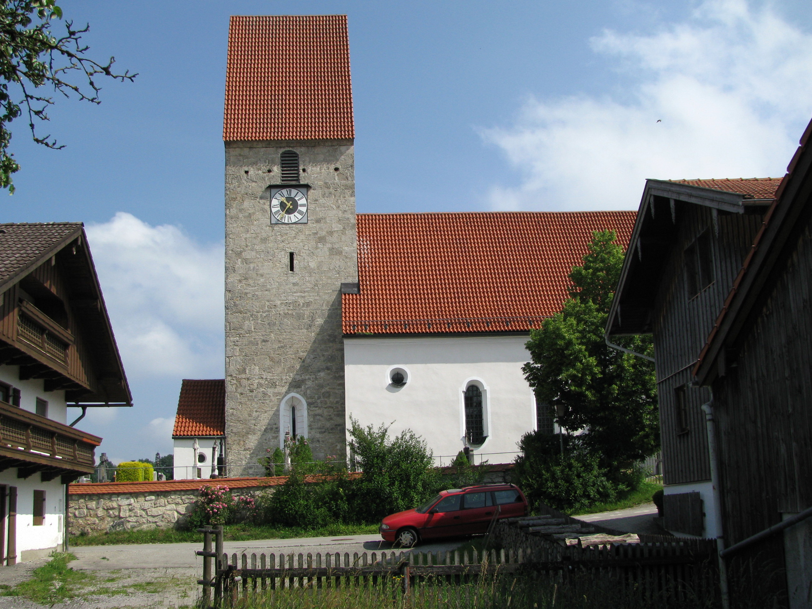 Marienkirche in Linden; Südansicht.